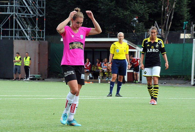 Kopparbergs/Göteborg FC forward Manon Melis